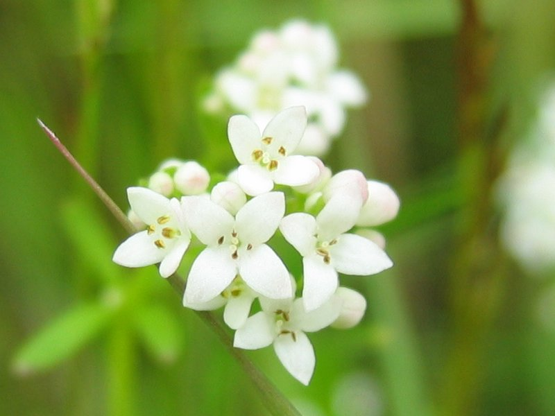 Sumpf-Labkraut Galium palustre, Zingst